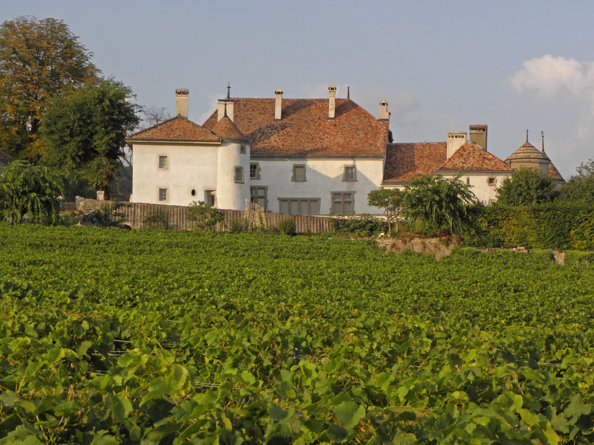 Le château du Rosey à Bursins